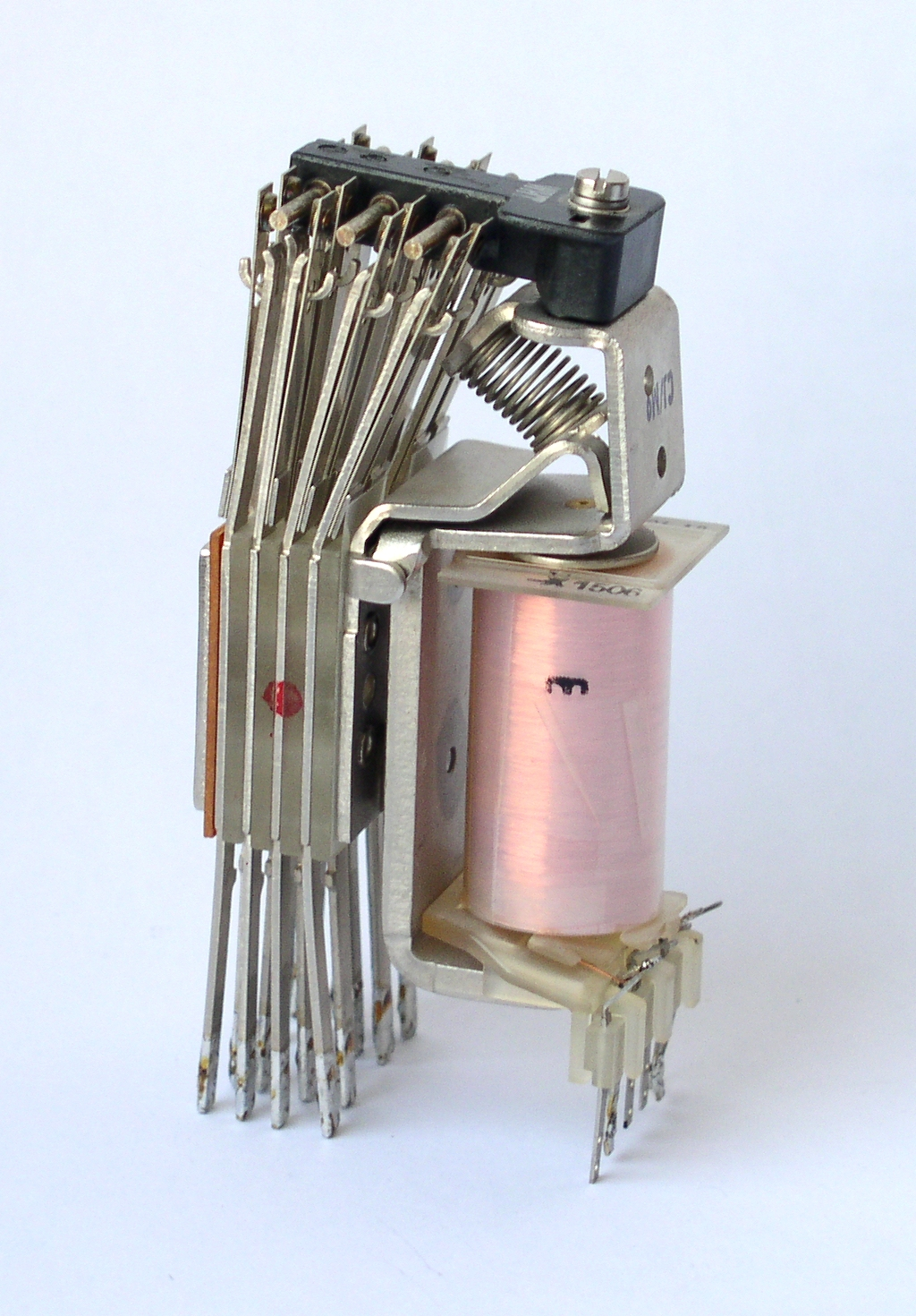 Signalrelais K50, monostabil, Hersteller: Siemens, entwickelt in den 50er Jahren des 20. Jahrhunderts